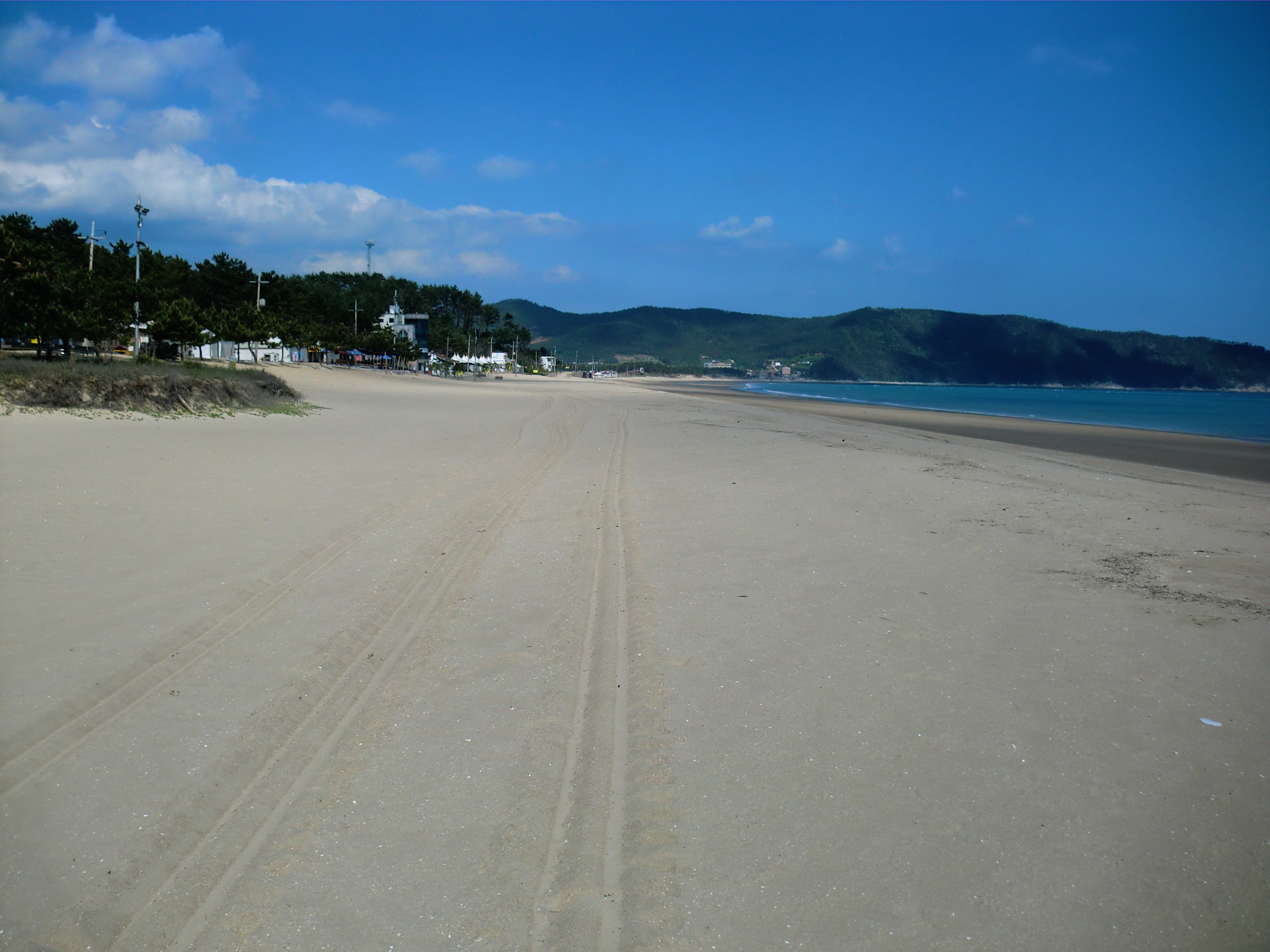 전라남도 완도군에 있는 명사십리